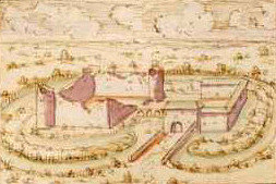 Abbildung der Burg Schönforst im heutigen Aachen aus dem Codex Welser